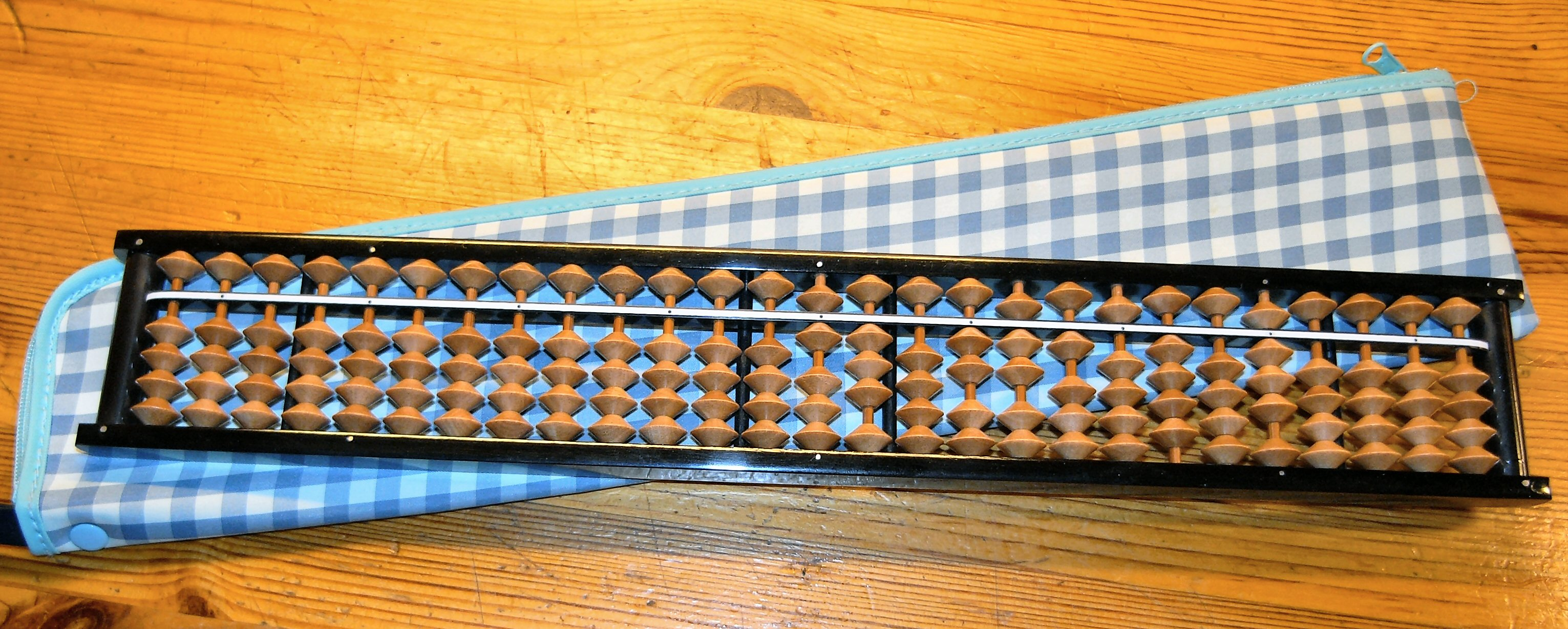 Japansk kuleramme (Soroban).